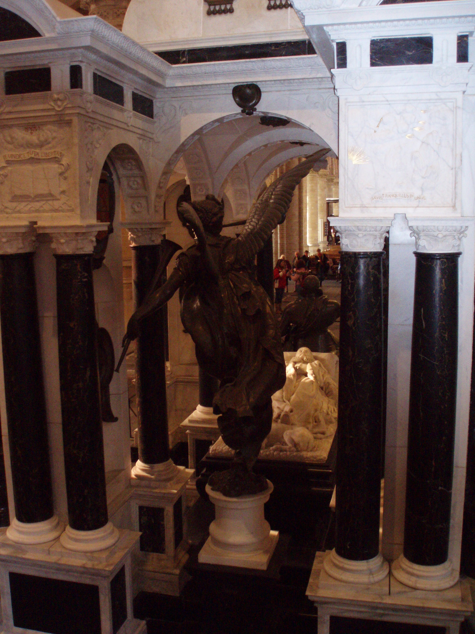 Eigen foto, oktober 2006 (c) Looi